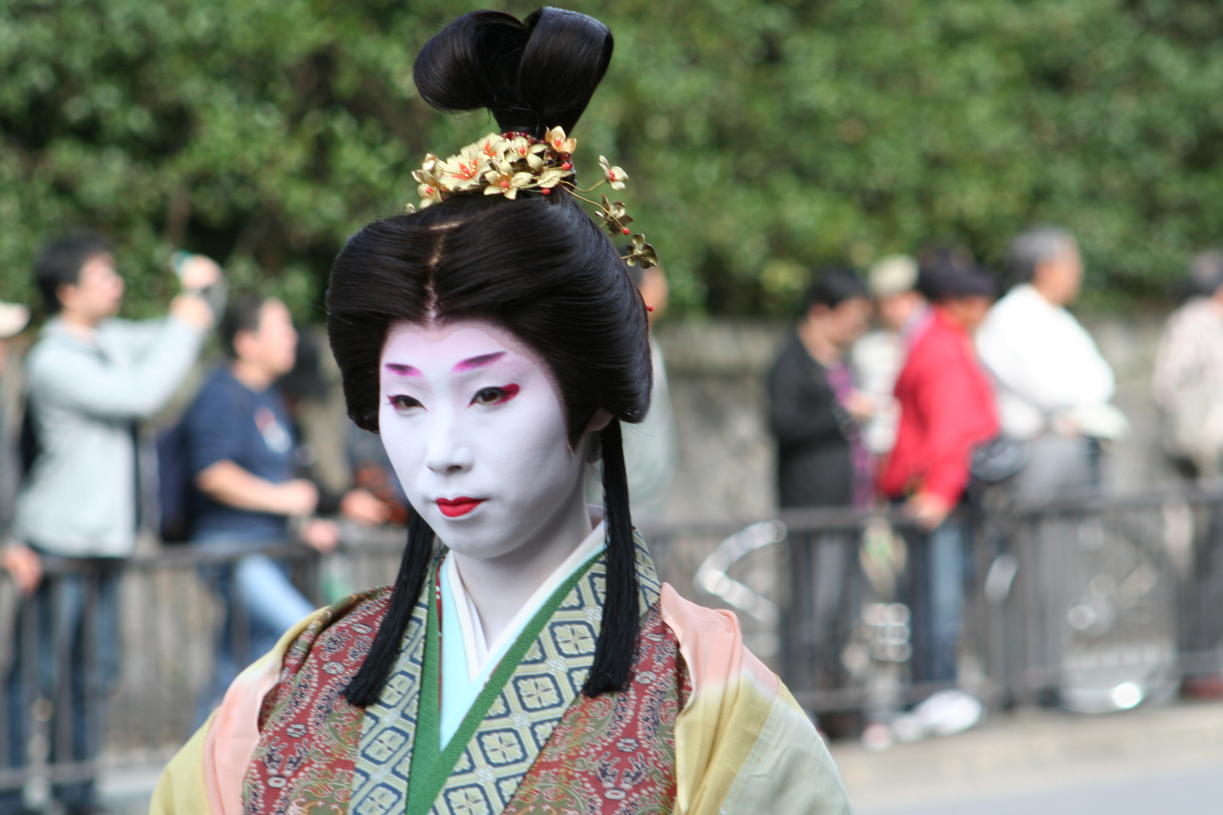 京都府京都市にて開催された時代祭。正午の御所から平安神宮までの行進の様子。2009年10月22日撮影。